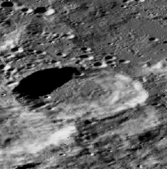 Cráter lunar Cysatus (LRO)